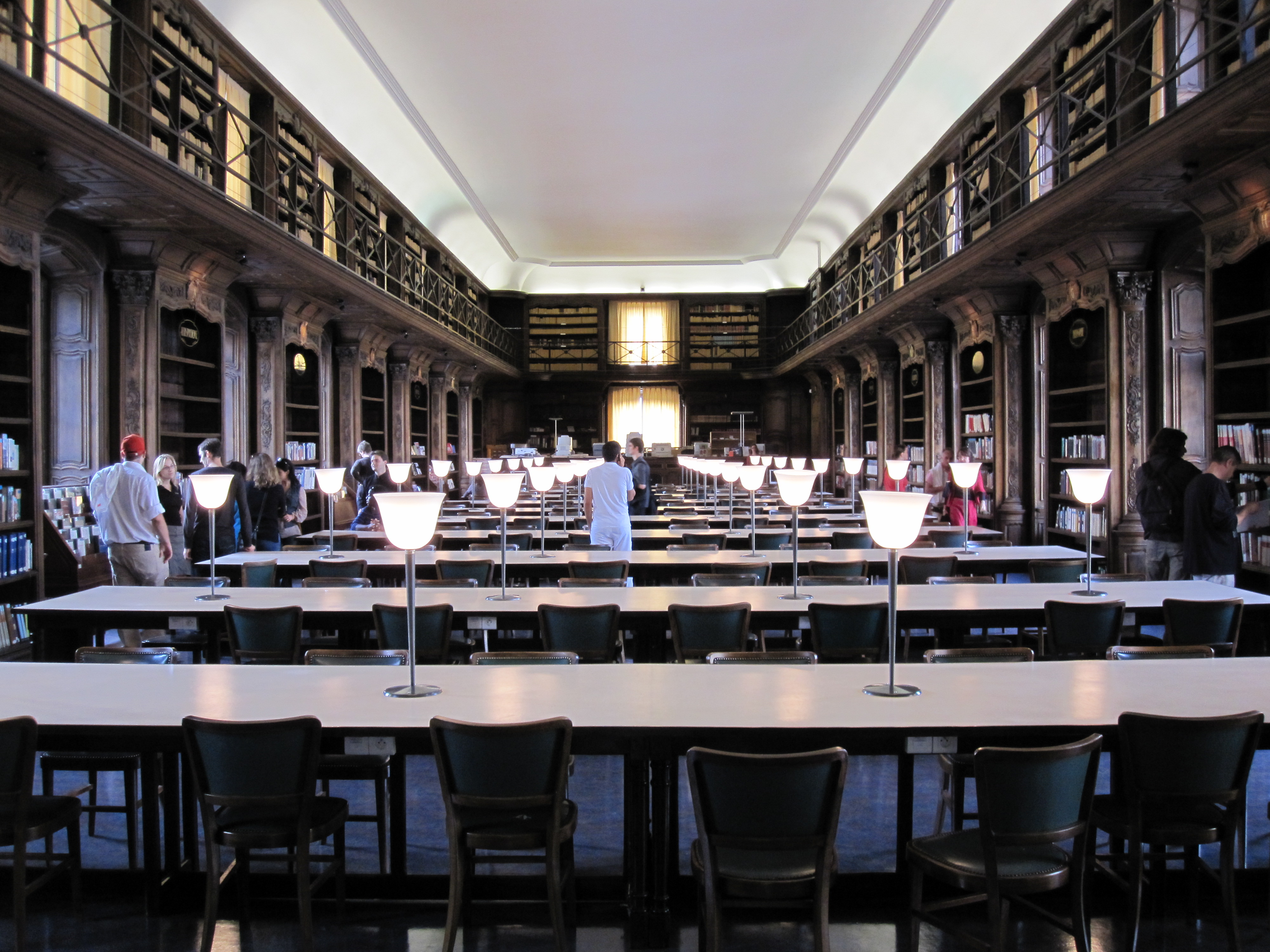 54 Nancy bibliothèque municipale - salle de lecture